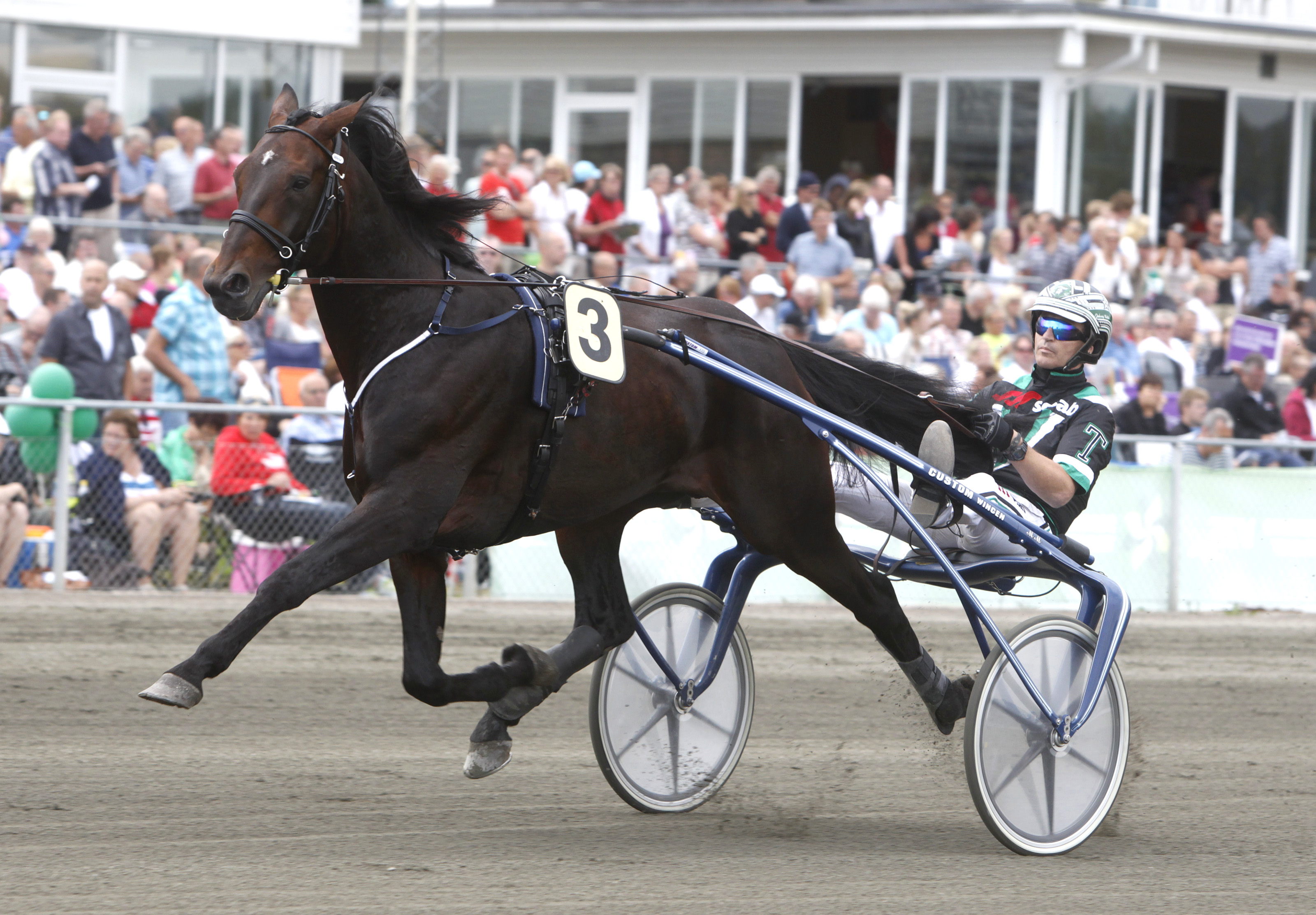 foto : mg : foto: micke gustafsson/foto-mike bollnäs 20120728 beanie m.m. med johnny takter